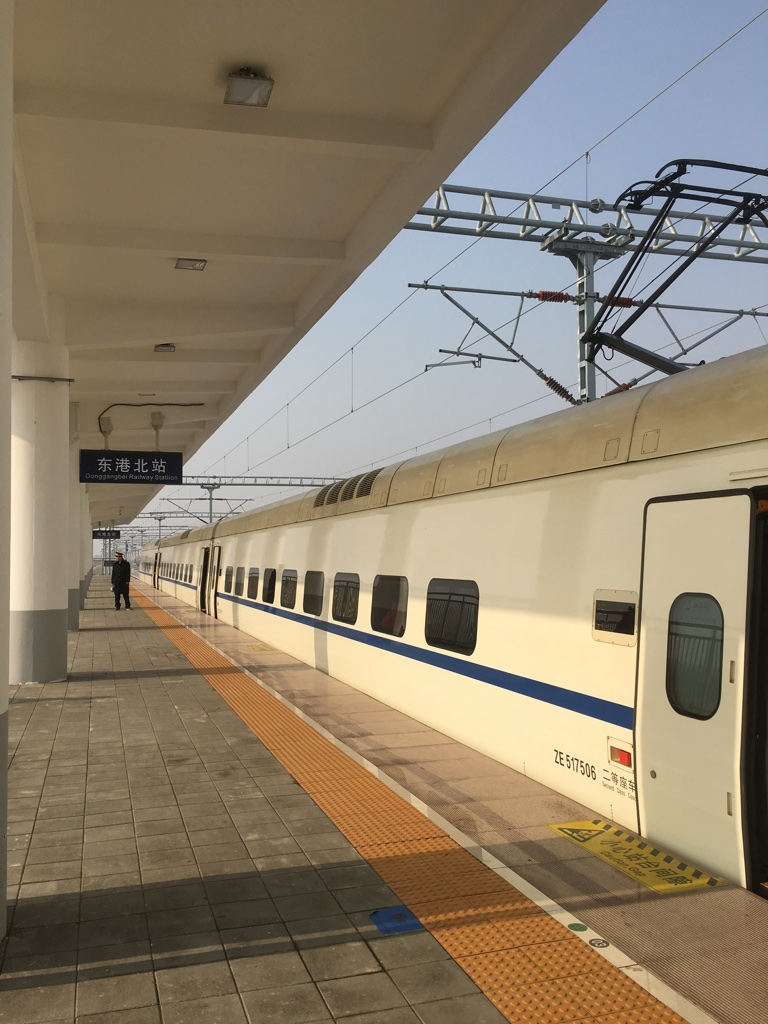 中文（中国大陆）: 由丹东站始发开往大连北站的D7706次列车停靠于东港北站